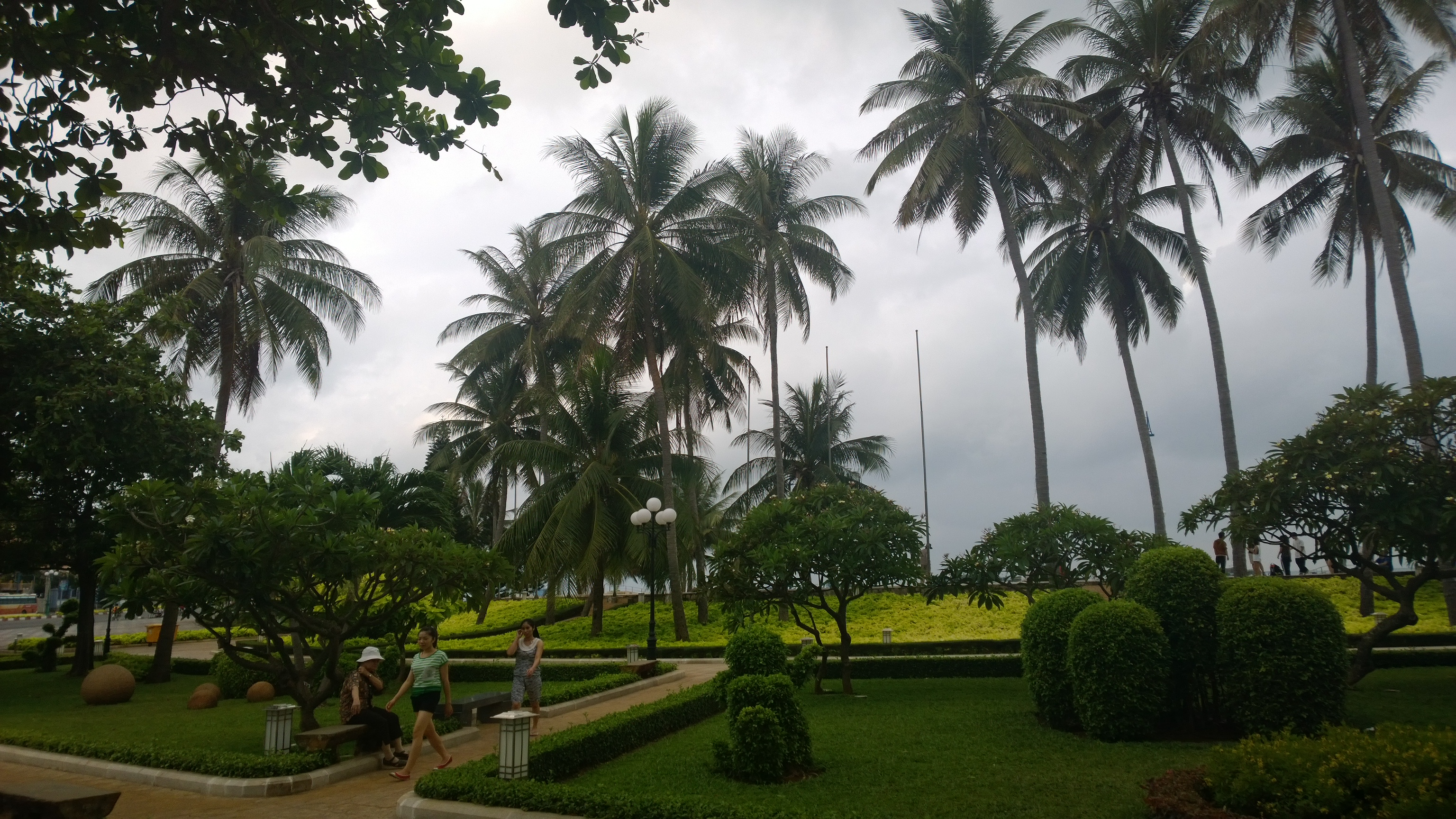 cong vien bai truoc-Phường 1, tp. Vũng Tàu, Bà Rịa - Vũng Tàu, Việt Nam